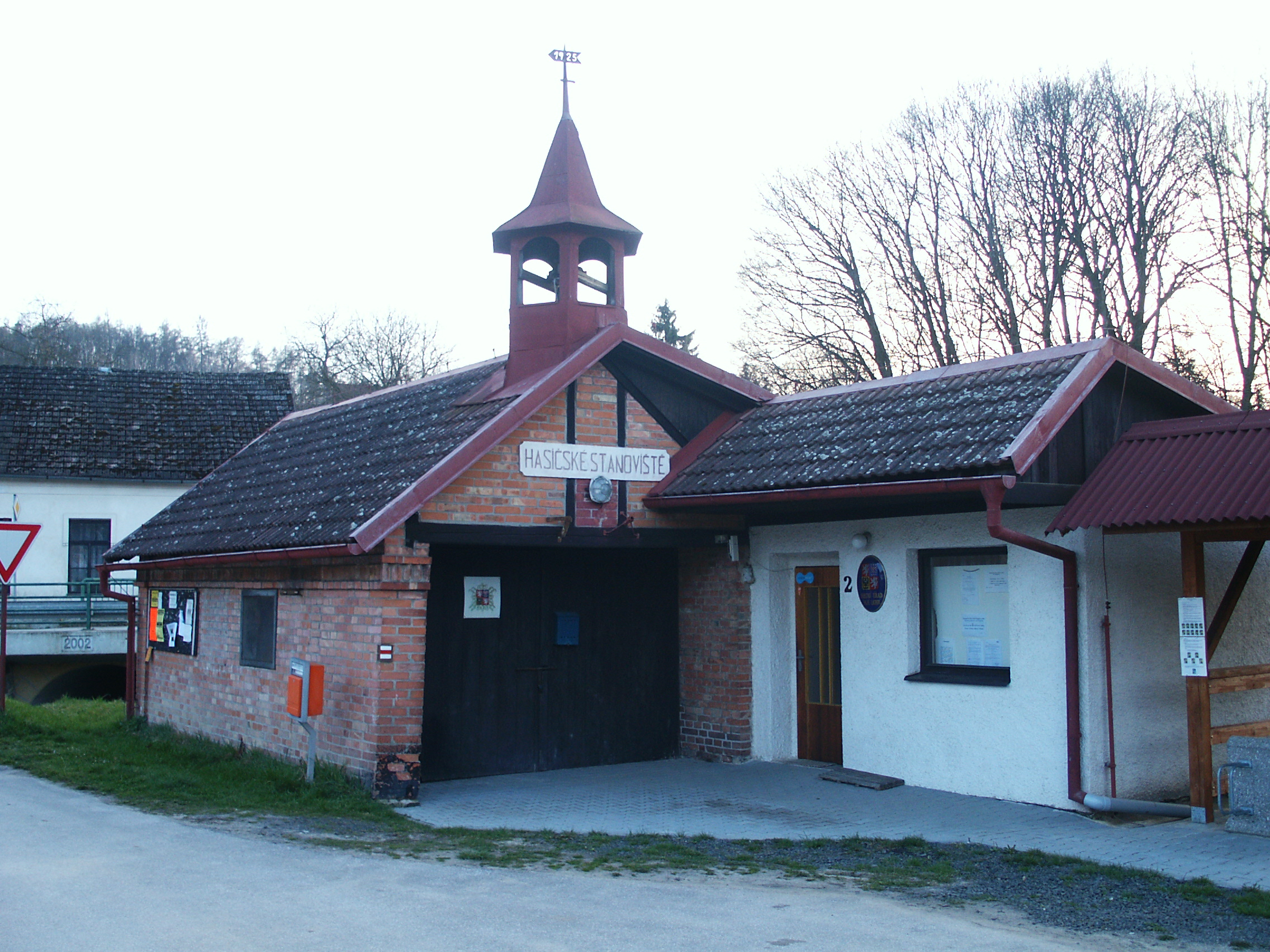 Dolní Lochov - č.p. 2 (hasičské stanoviště + obecní úřad)